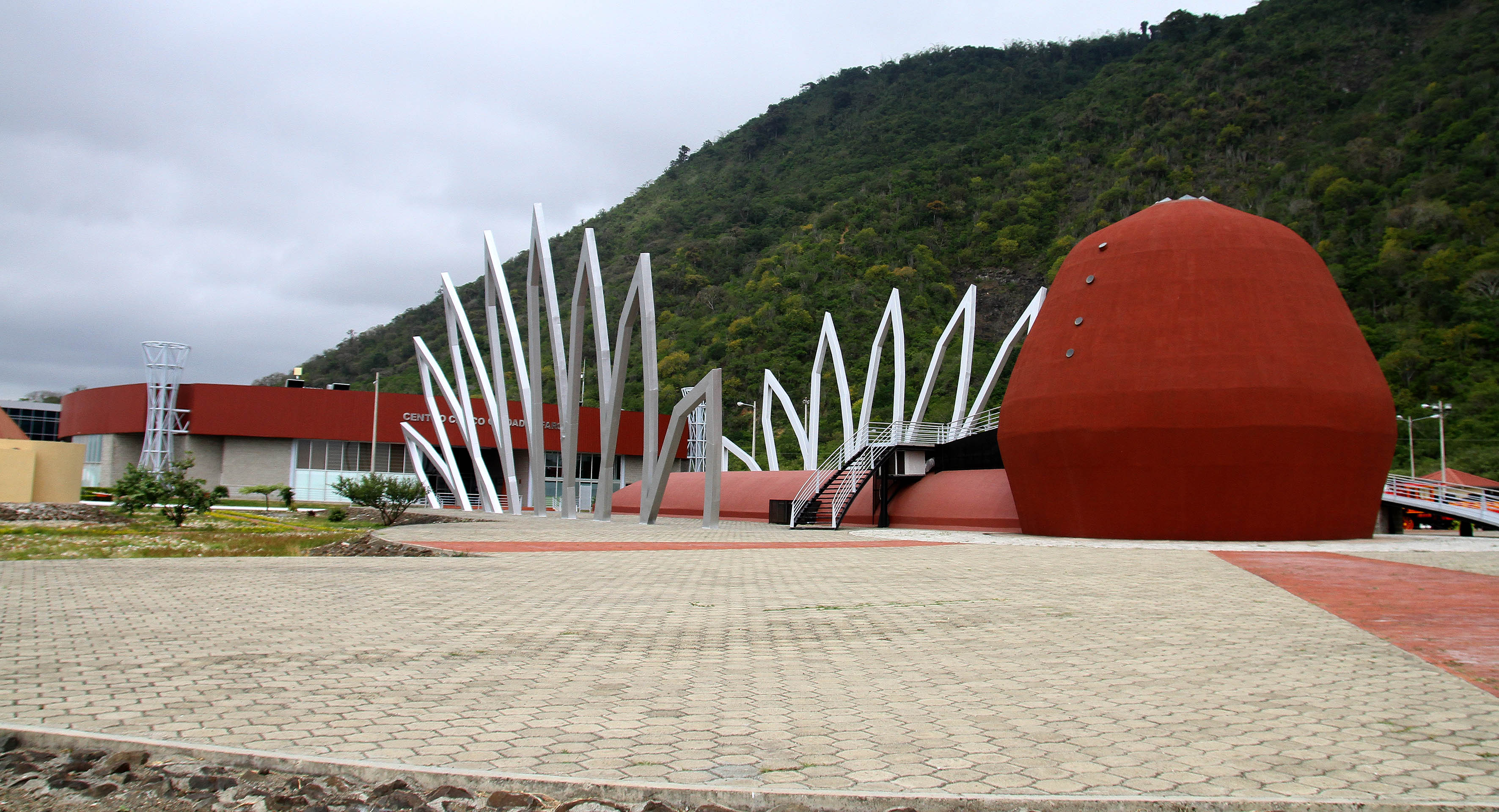 Montecristi, Manabí, 09 de may (Andes).-Al pie del cerro de Montecristi se levanta el Centro Cívico Ciudad Alfaro, la obra que fue presentada en el 2007, es un centro cívico lleno de arquitectura combinada con rasgos de la historia de Manabí y el país. Foto:César Muñoz/Andes